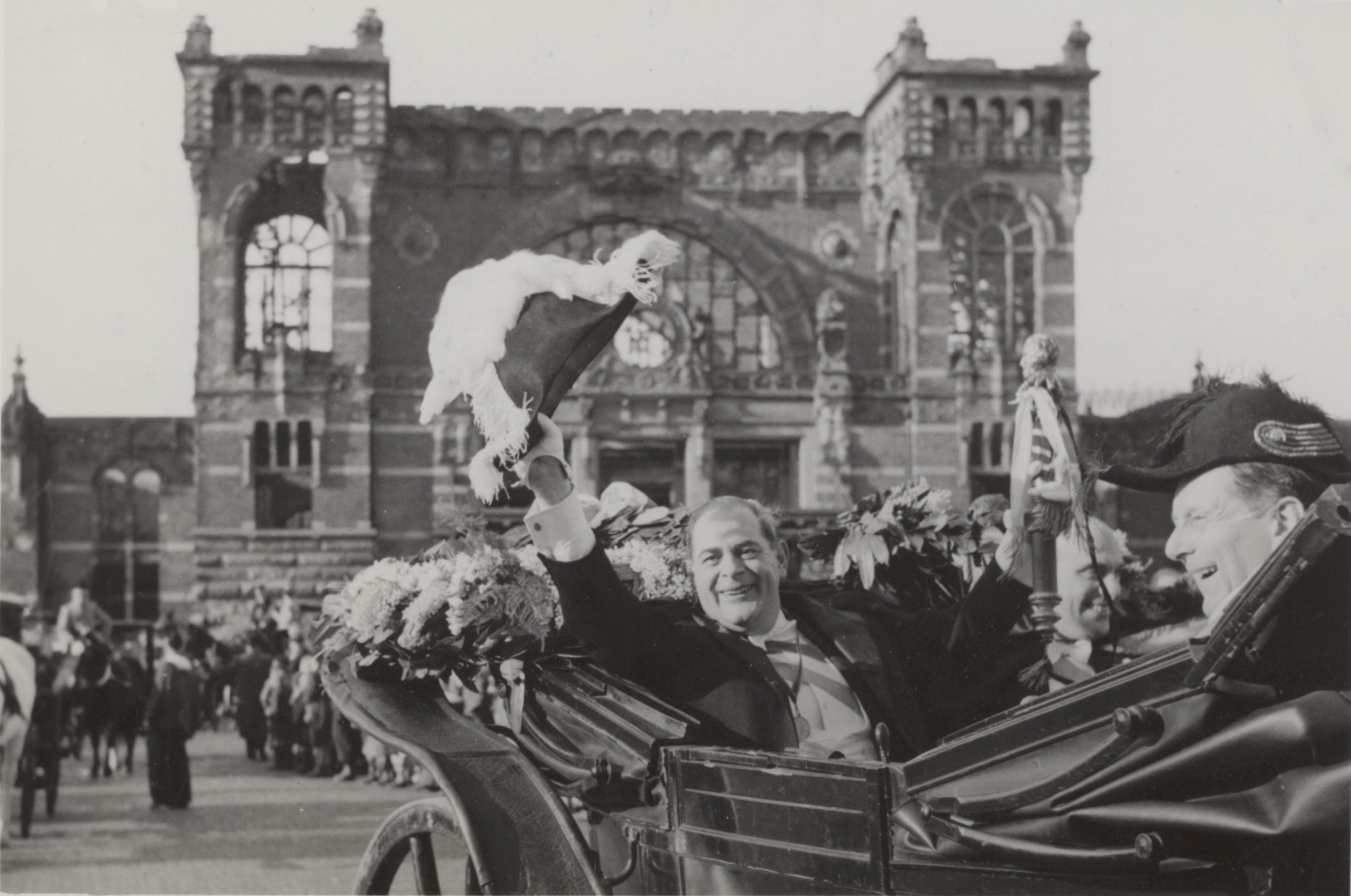 Collectie / Archief : Fotocollectie Elsevier Reportage / Serie : [ onbekend ] Beschrijving : carnavals, rijtoeren, rijtuigen, amadeiro Datum : 4 februari 1951 Locatie : Den Bosch Trefwoorden : carnavals, rijtoeren, rijtuigen Persoonsnaam : amadeiro Fotograaf : Fotograaf Onbekend / Anefo Auteursrechthebbende : Nationaal Archief Materiaalsoort : Foto (zwart/wit) Nummer archiefinventaris : bekijk toegang 2.24.05.02 Bestanddeelnummer : 044-0056